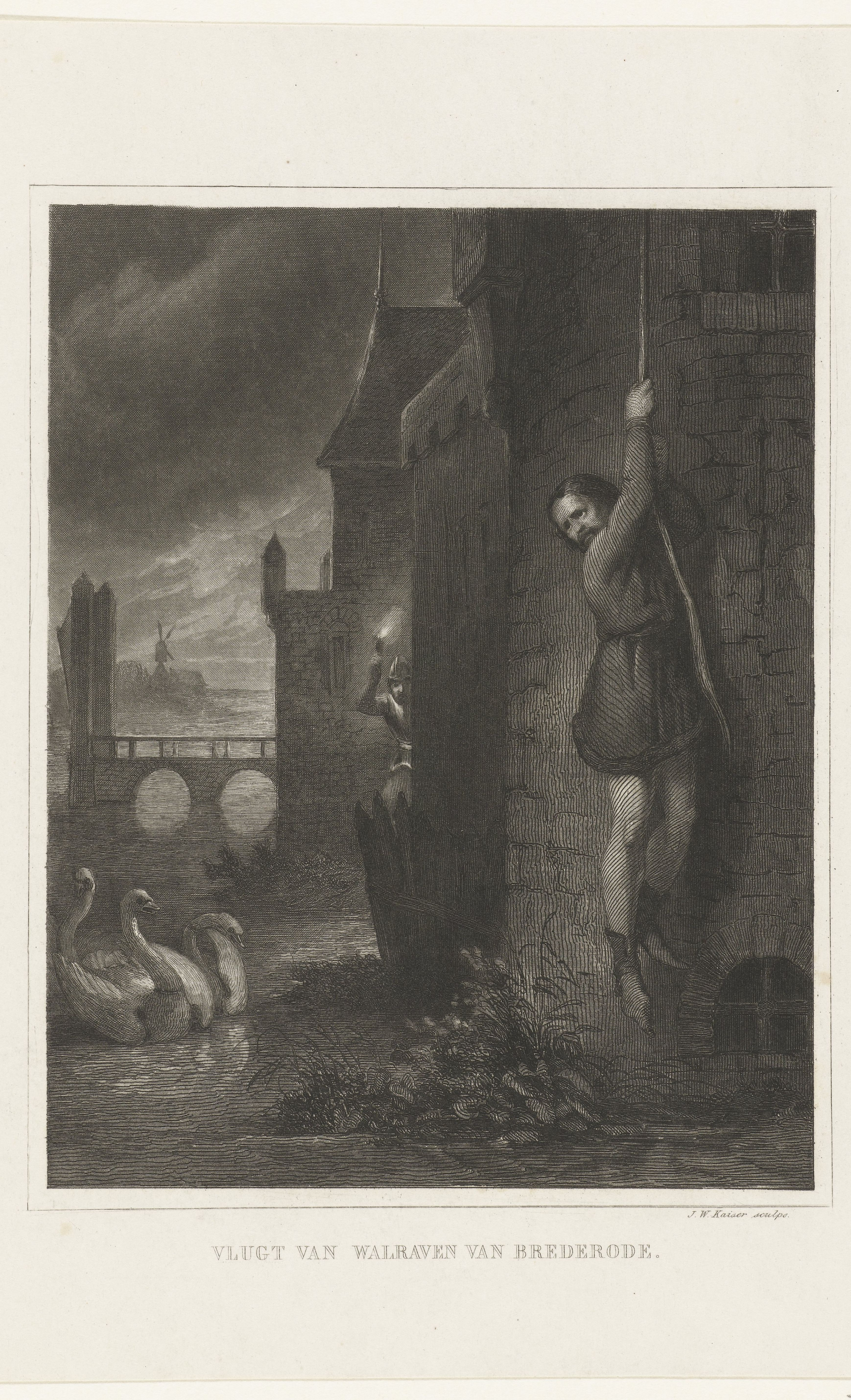 IdentificatieTitel(s): Vlucht van Walraven van Brederode, 1471Vlugt van Walraven van Brederode (titel op object)Objecttype: prent historieprent Objectnummer: RP-P-OB-78.343Catalogusreferentie: FMH 309Atlas van Stolk 19Atlas van Stolk 194Omschrijving: Vlucht van Walraven van Brederode uit het slot te Wijk bij Duurstede, 1471. Hij laat zich aan een touw van een toren zakken.VervaardigingVervaardiger: prentmaker: Johann Wilhelm Kaiser (I) (vermeld op object)Plaats vervaardiging: NederlandDatering: 1844 - 1846Fysieke kenmerken: staalgravureMateriaal: papier Techniek: staalgravureAfmetingen: papier: h 228 mm × b 175 mmToelichtingIllustratie voor: J.P. Arend, Algemeene geschiedenis des vaderlands, Amsterdam, 5 delen, 1840-1882, dl. 2.3, p. 104.OnderwerpWat: Bourgondische tijd in NederlandWanneer: 1471 - 1471Waar: Wijk bij DuurstedeWie: Walraven van Brederode (15e eeuw)Verwerving en rechtenVerwerving: aankoop 1881Copyright: Publiek domein